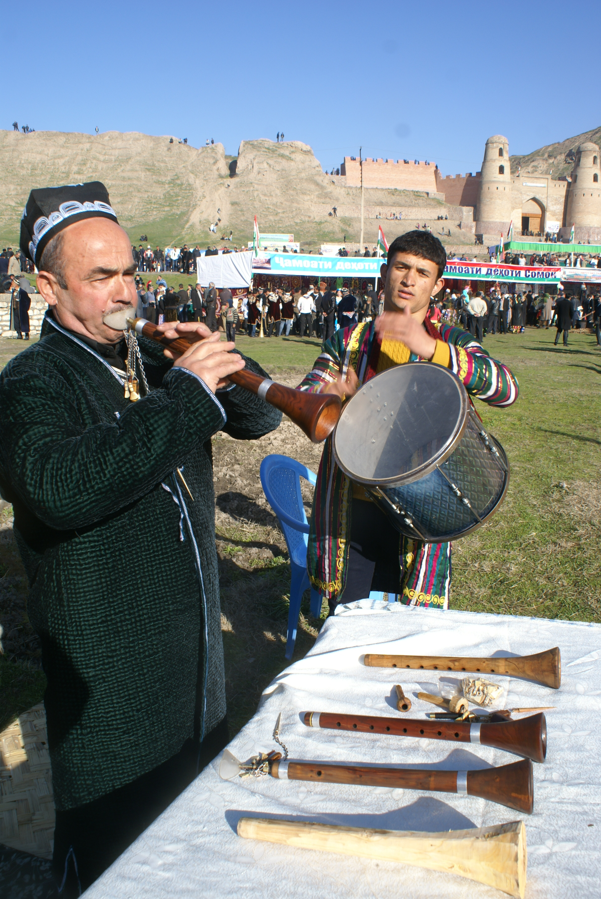 Тоҷикӣ: Сурнайчӣ ва созҳои сурнай. Созҳои миллӣ (Ҳиссор, Тоҷикистон)